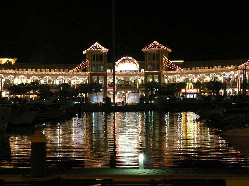 Souq Sharq